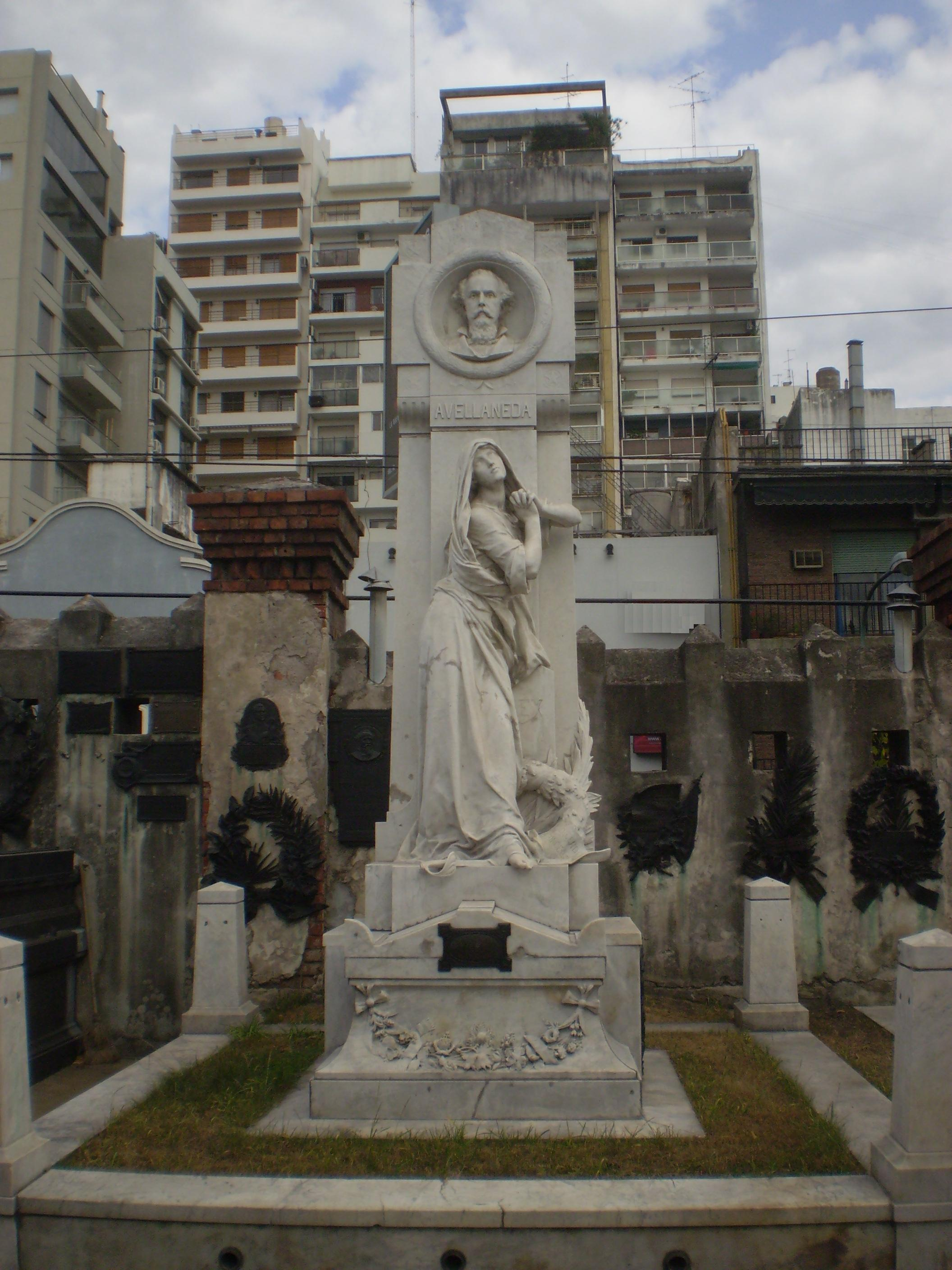 Monumento fúnebre de Nicolás Avellaneda, Cementerio de la Recoleta, Buenos Aires.